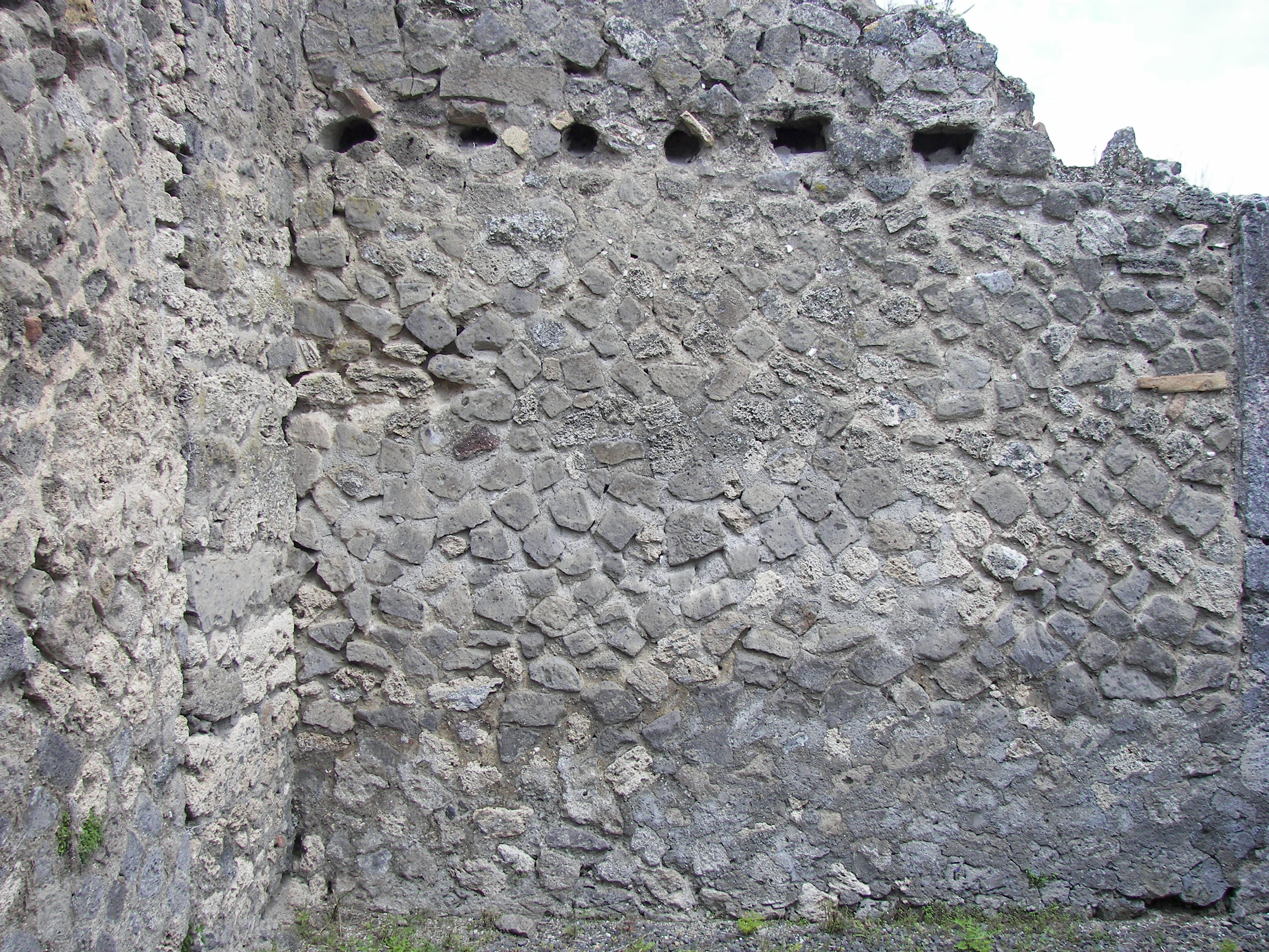 Building at VII.14.20 in Pompeii.